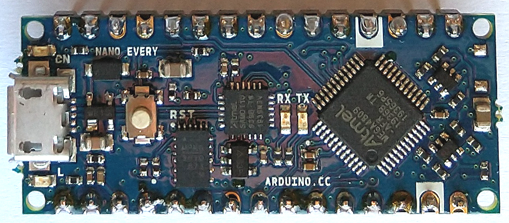 Oberseite des Arduino Nano Every